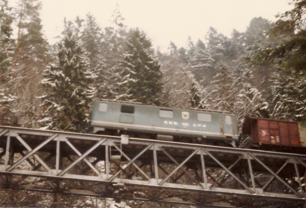 HGe 4/4 1991 auf der Husenbachbrücke über Hausen